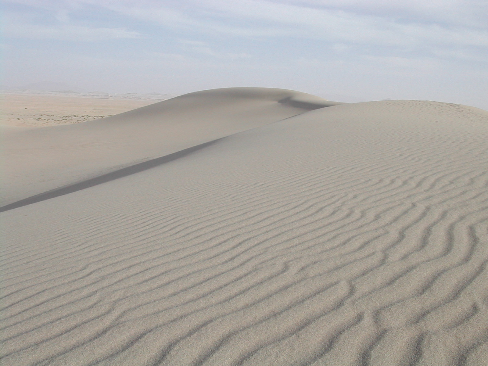 Dune blanche Algérie (near Ideles)